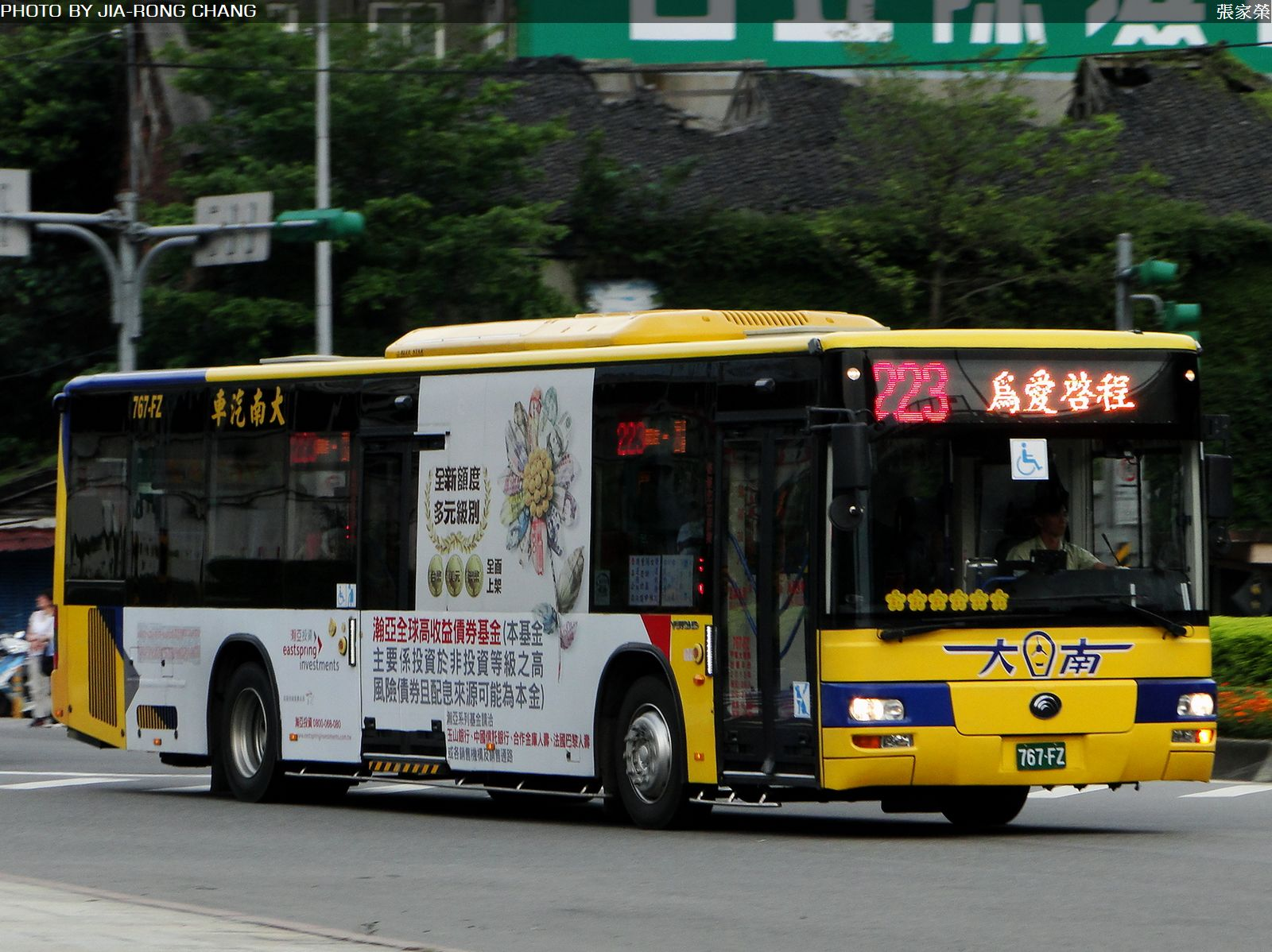 YOUTONG - ZK6128HG - 767-FZ